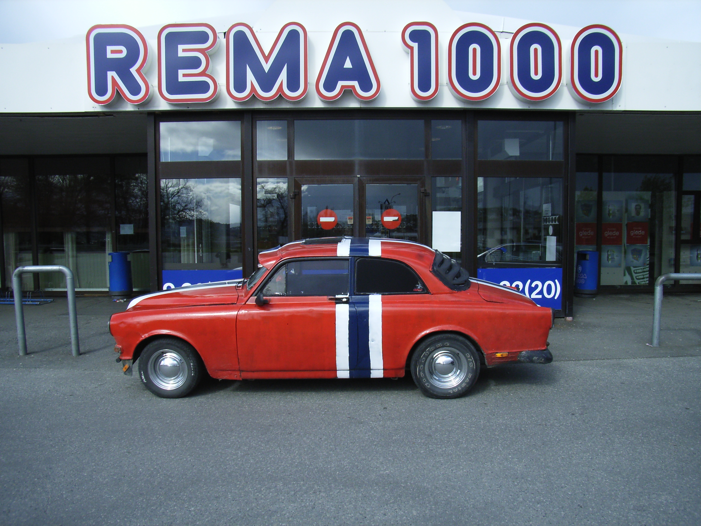 med laksetrapp og terningerEn nasjonalistisk Volvo Amazon foran REMA 1000